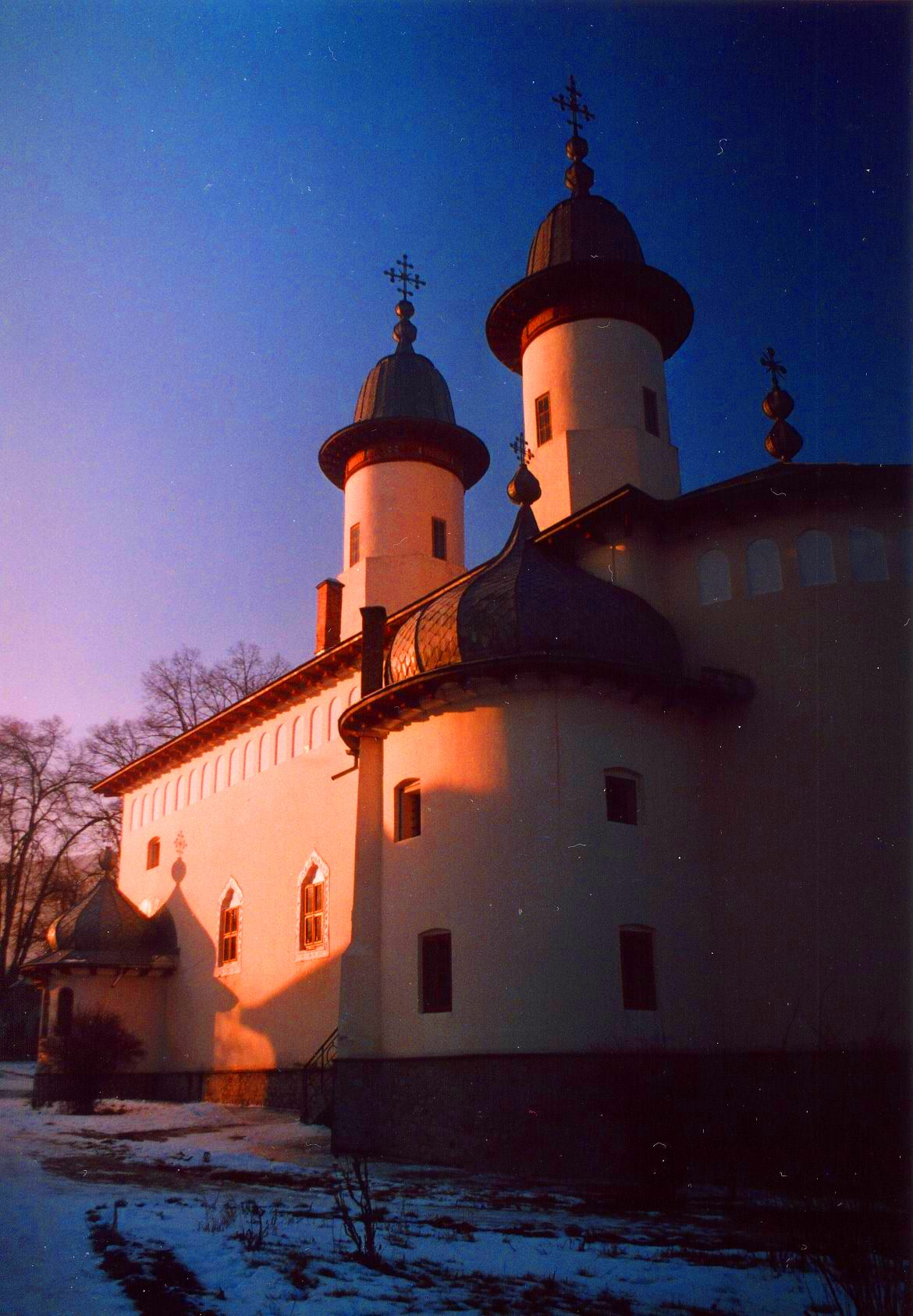 Mănăstirea Văratic 01